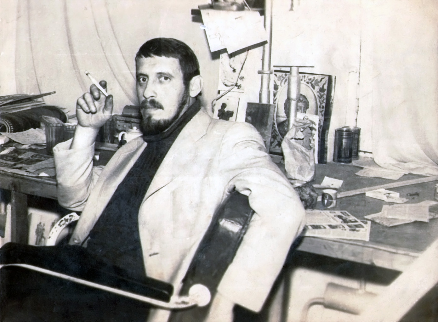 Константин Козловский в мастерской. 1980 год.